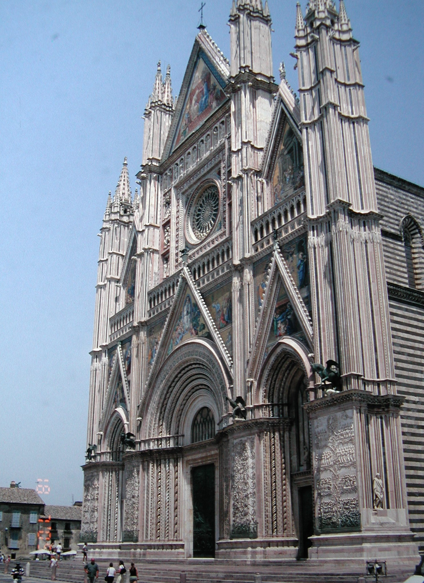 De dom van Orvieto, Italie